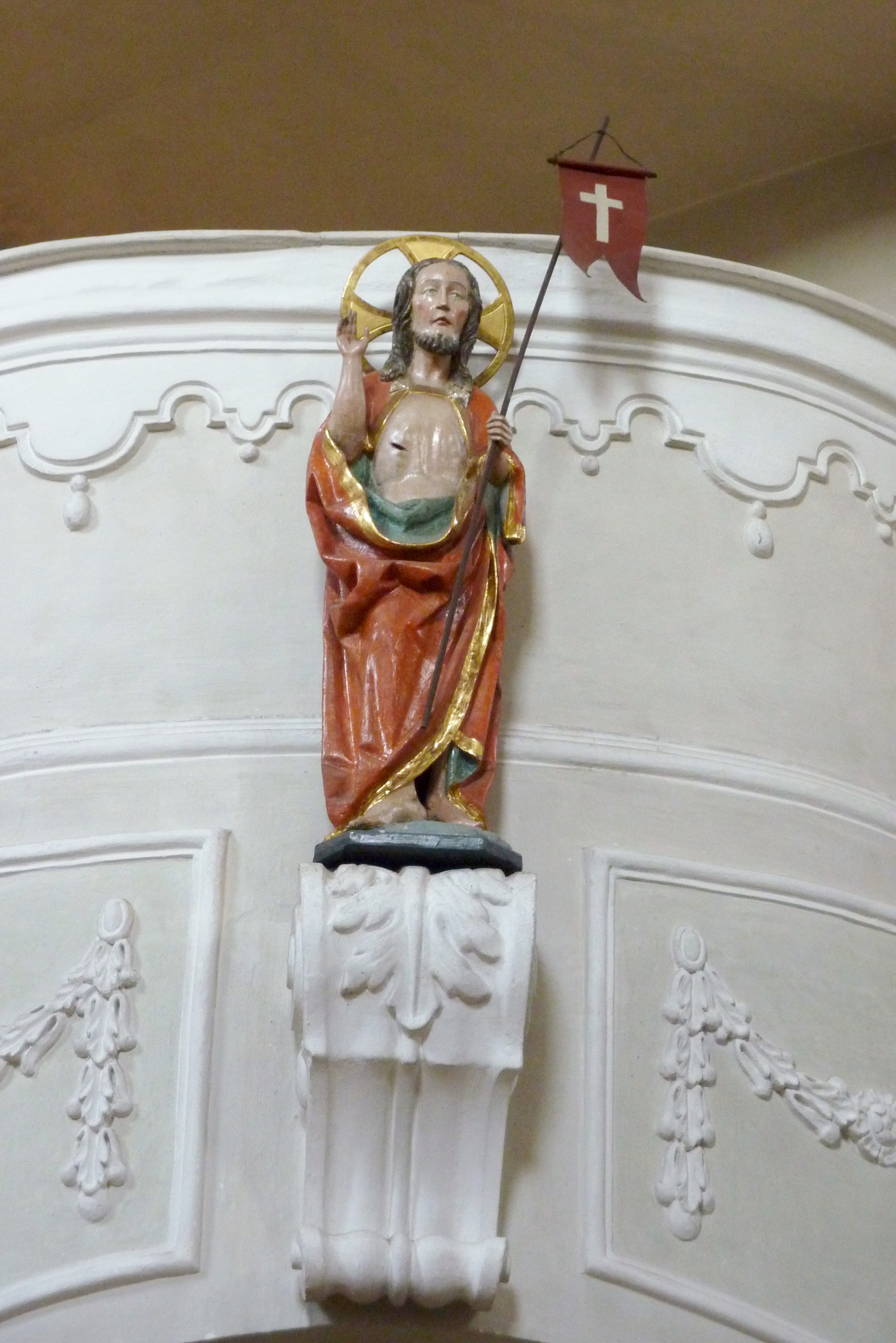 Wallfahrtskirche Mariä Heimsuchung (Zu Unserer lieben Frau vom Roggenacker) in Flochberg, einem Stadtteil von Bopfingen im Ostalbkreis (Baden-Württemberg), Auferstehungschristus